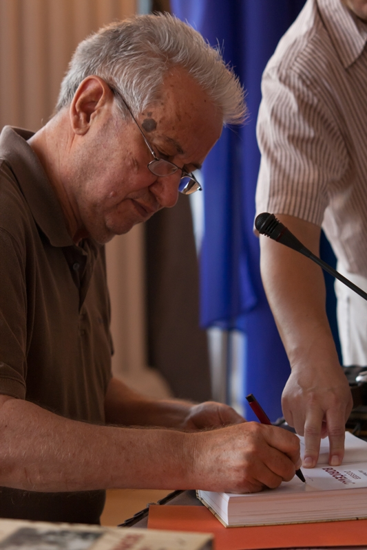 Predstavljanje knjige Dossier Boričevac